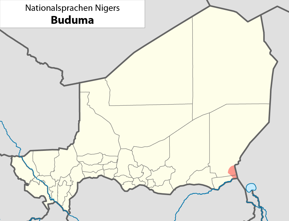 Nationalsprachen des NigerDie dargestellte Nationalsprache kann dem Dateinamen entnommen werden.